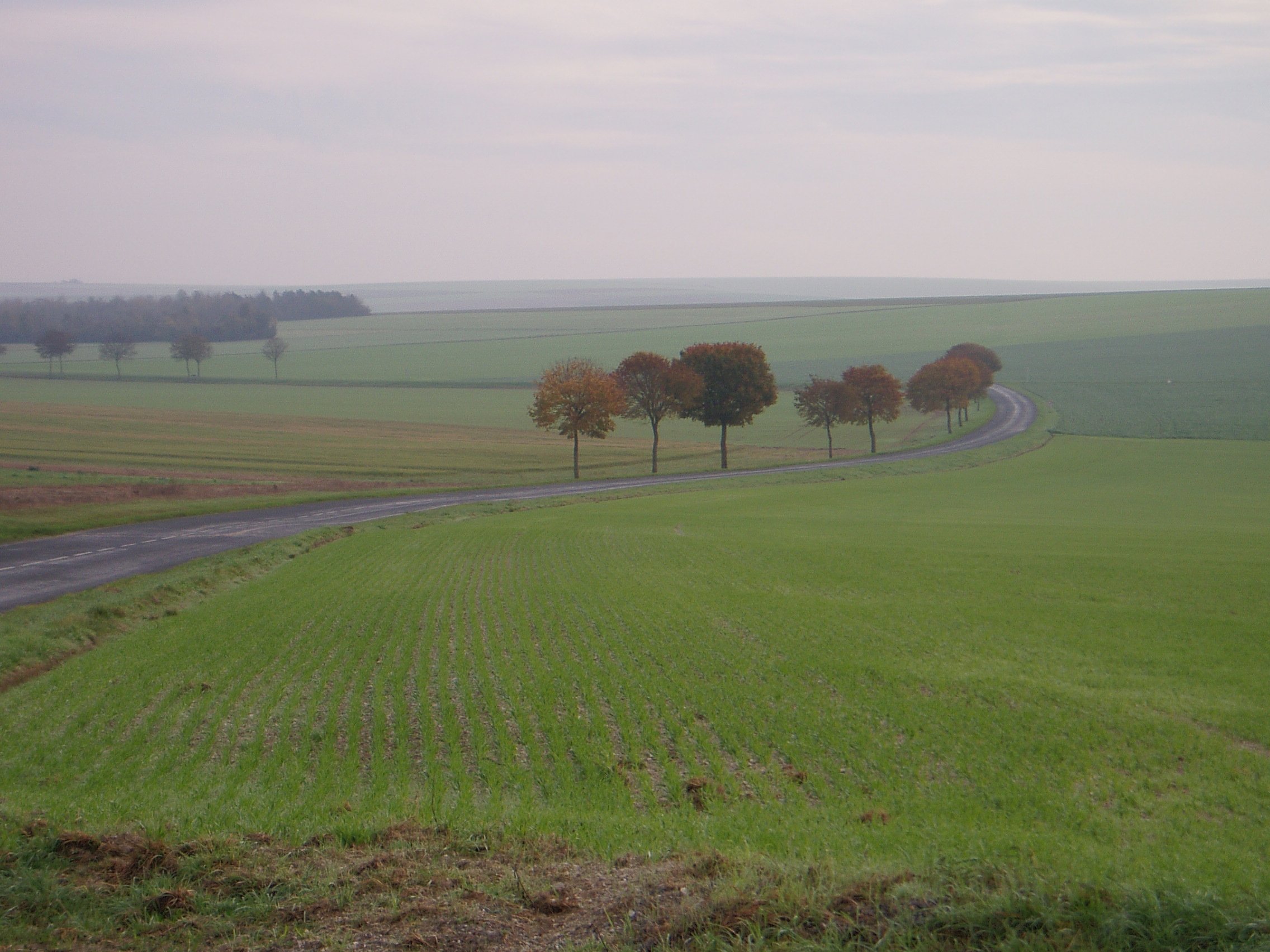 Landscape east of Faux-sur-Coole (municipality of Faux-Vésigneul, Marne, France) - Champagne plain